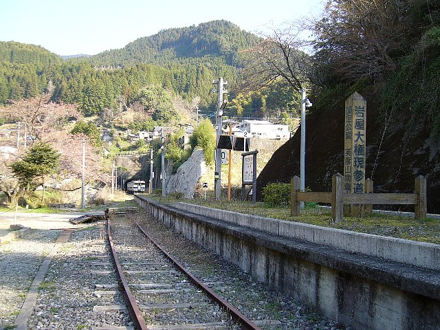 日田彦山線 筑前岩屋駅 釈迦岳トンネルを抜け、構内へ進入するDC 2006年3月 Bakkai撮影